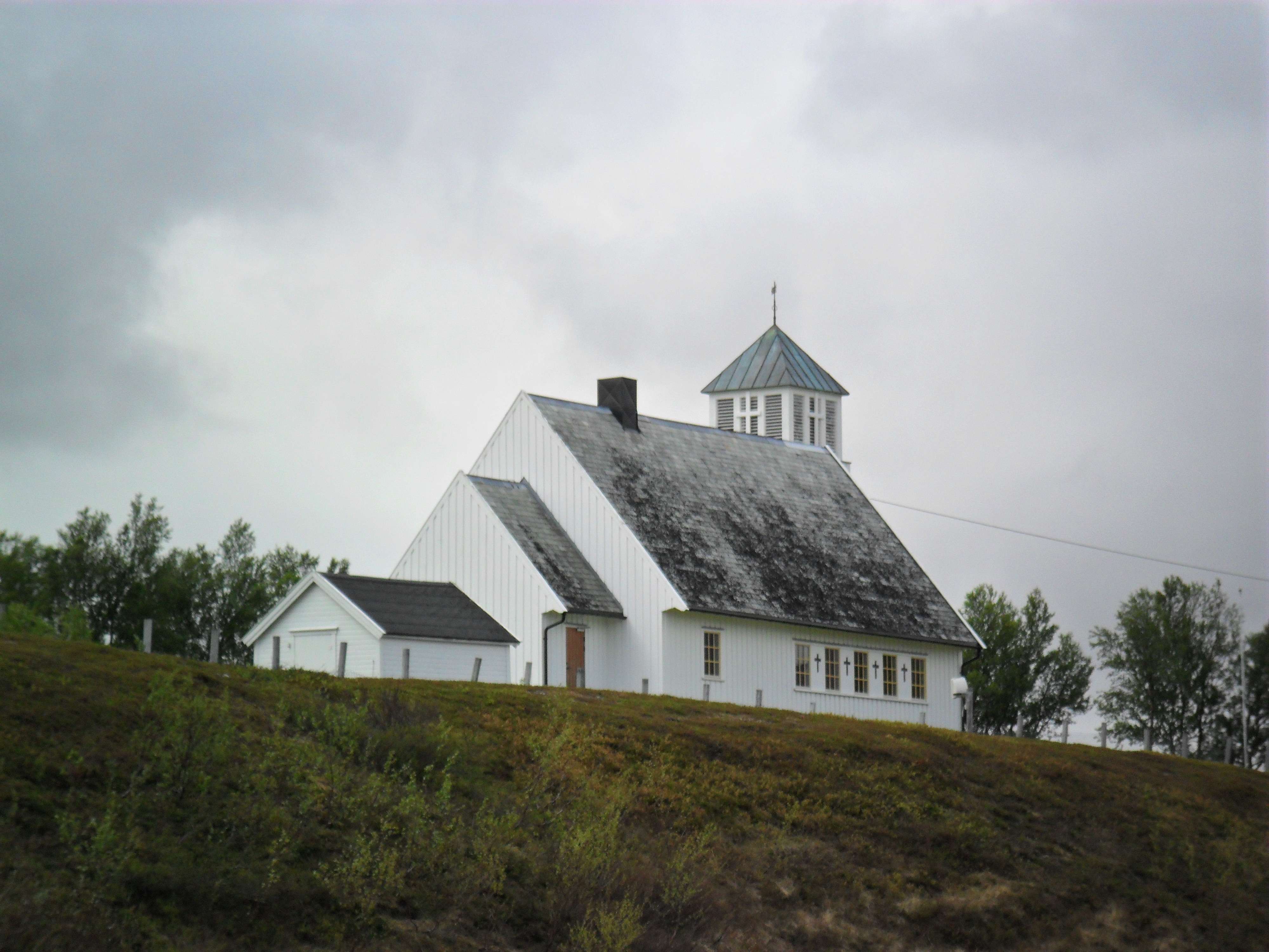 Kokelv kirke i Kvalsund kommune, Finnmark. Reist av tyskere efter krigen som en forsoningsgave.